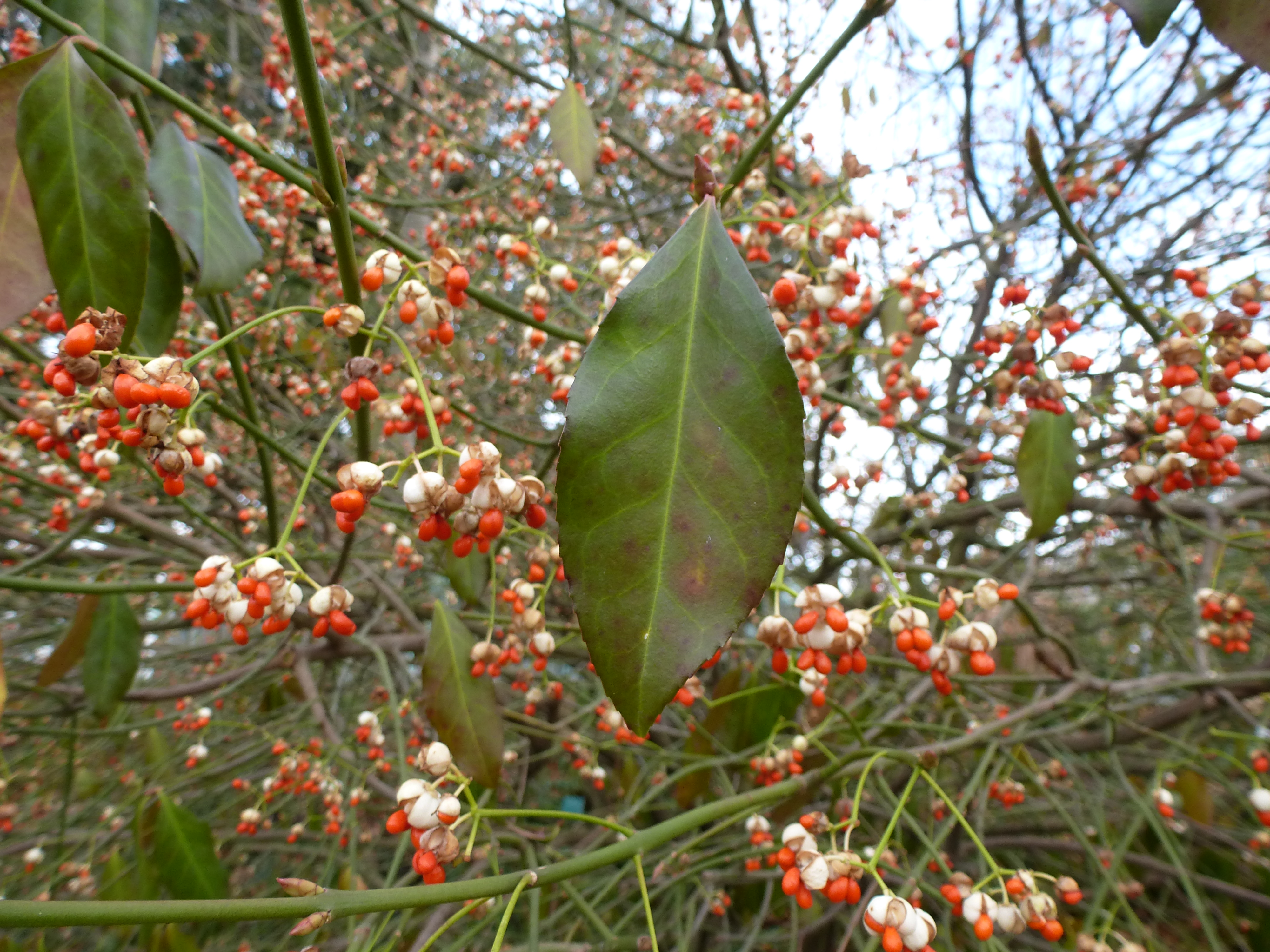 Euonymus fortunei 'vegeta', feuille et fruits en hiver. Serres d'Auteuil - Jardin botanique de la ville de Paris - France